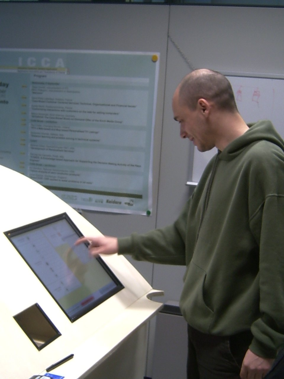 Imagen de un kiosko interactivo.